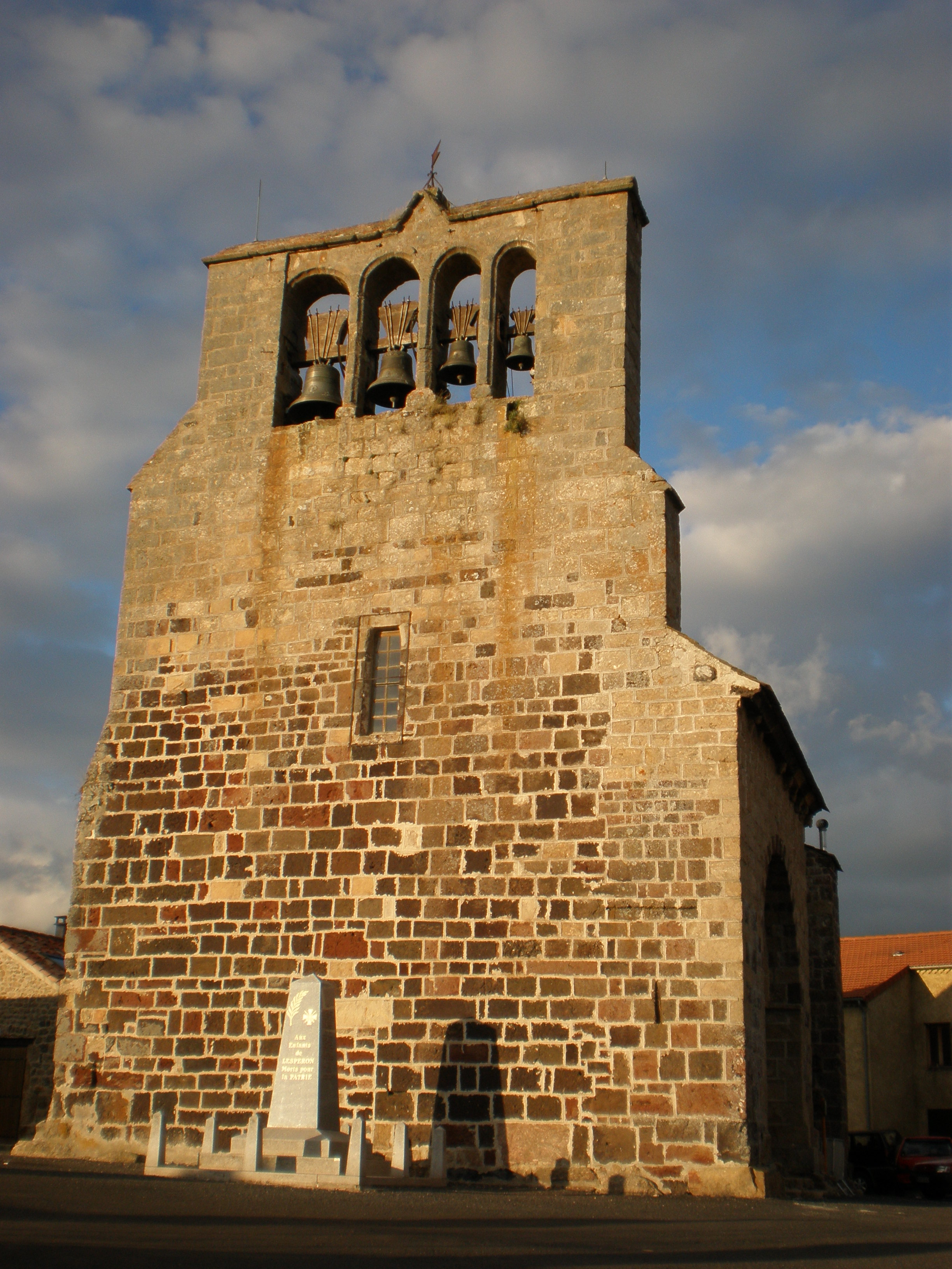 Église de Lespéron (Ardèche). Classée monument historique par arrêté du 9 août 1941.